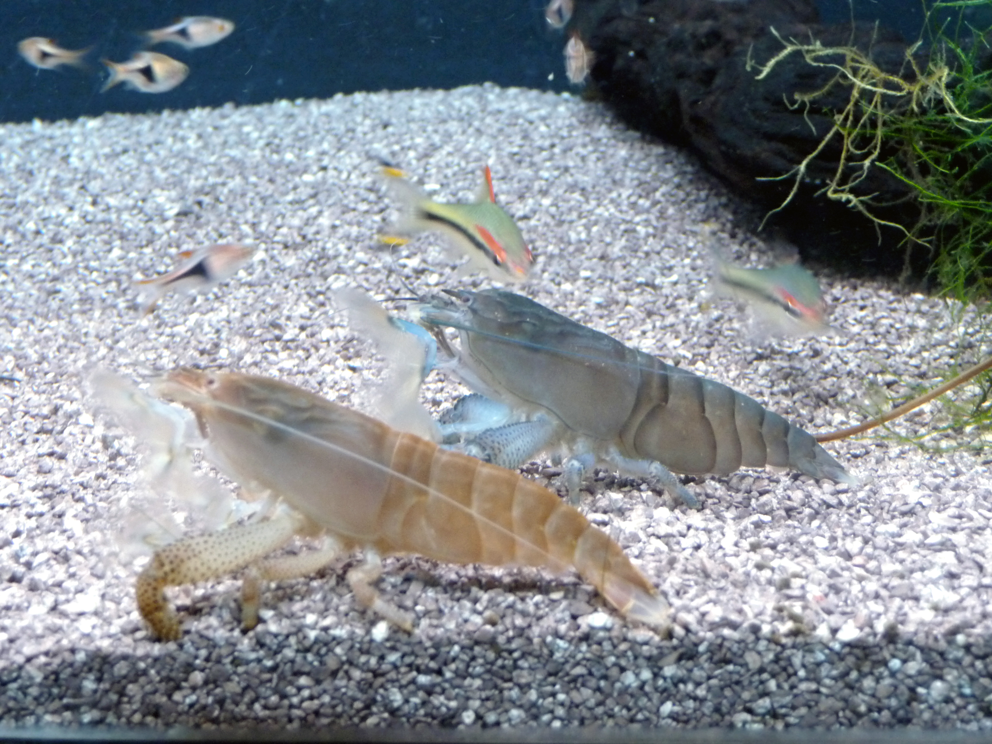 deux Atya gabonensis, variétés bleue et dorée